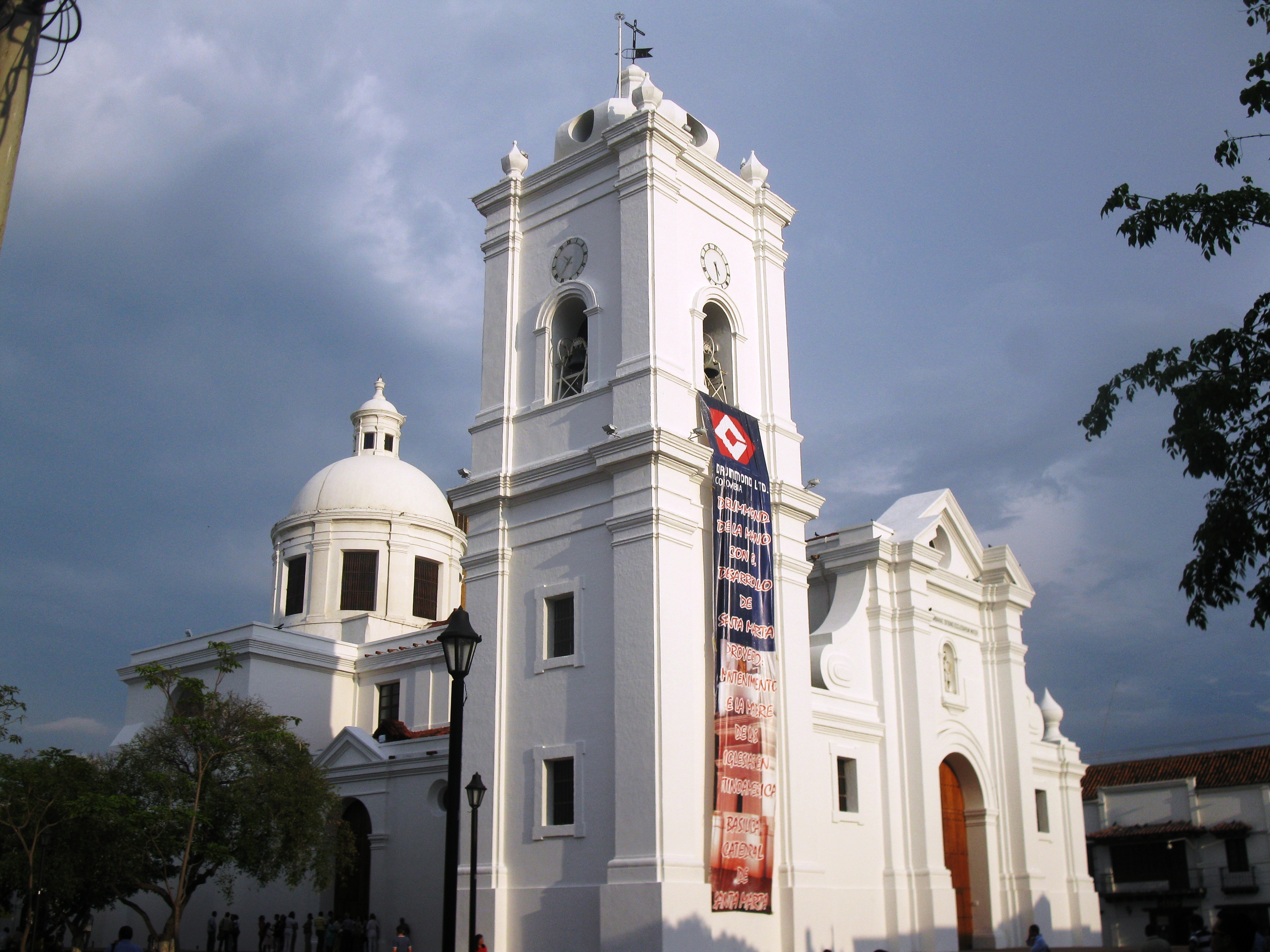 Sector Antiguo de la ciudad de Santa Marta